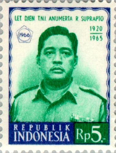 Soeprapto (general)